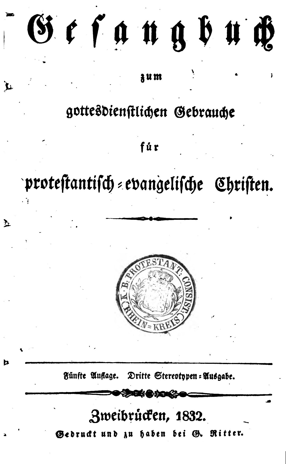 Titelblatt des Gesangbuchs zum gottesdienstlichen Gebrauche für protestantisch-evangelische Christen (im Bayr. Rheinkreise)